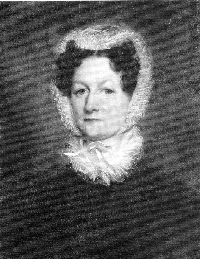 Porträt von Caroline Ramée, geb. Dreyer (1787-1873), Ehefrau des Architekten Joseph Ramée (1764-1842)